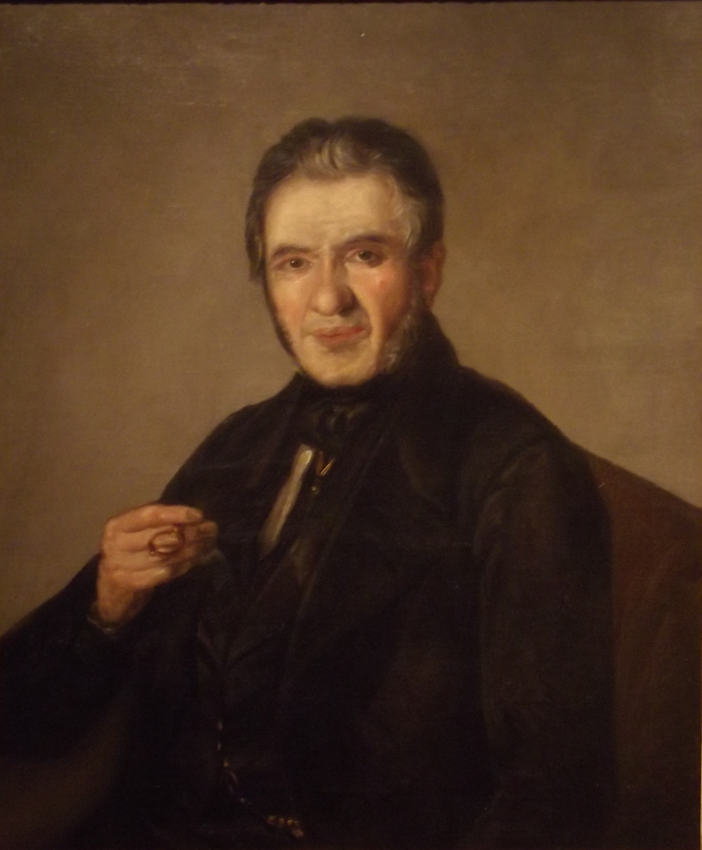 Retrato del abogado, diplomático y político español Agustín de Argüelles Álvarez (1776-1844), que fue tutor de la reina Isabel II de España.